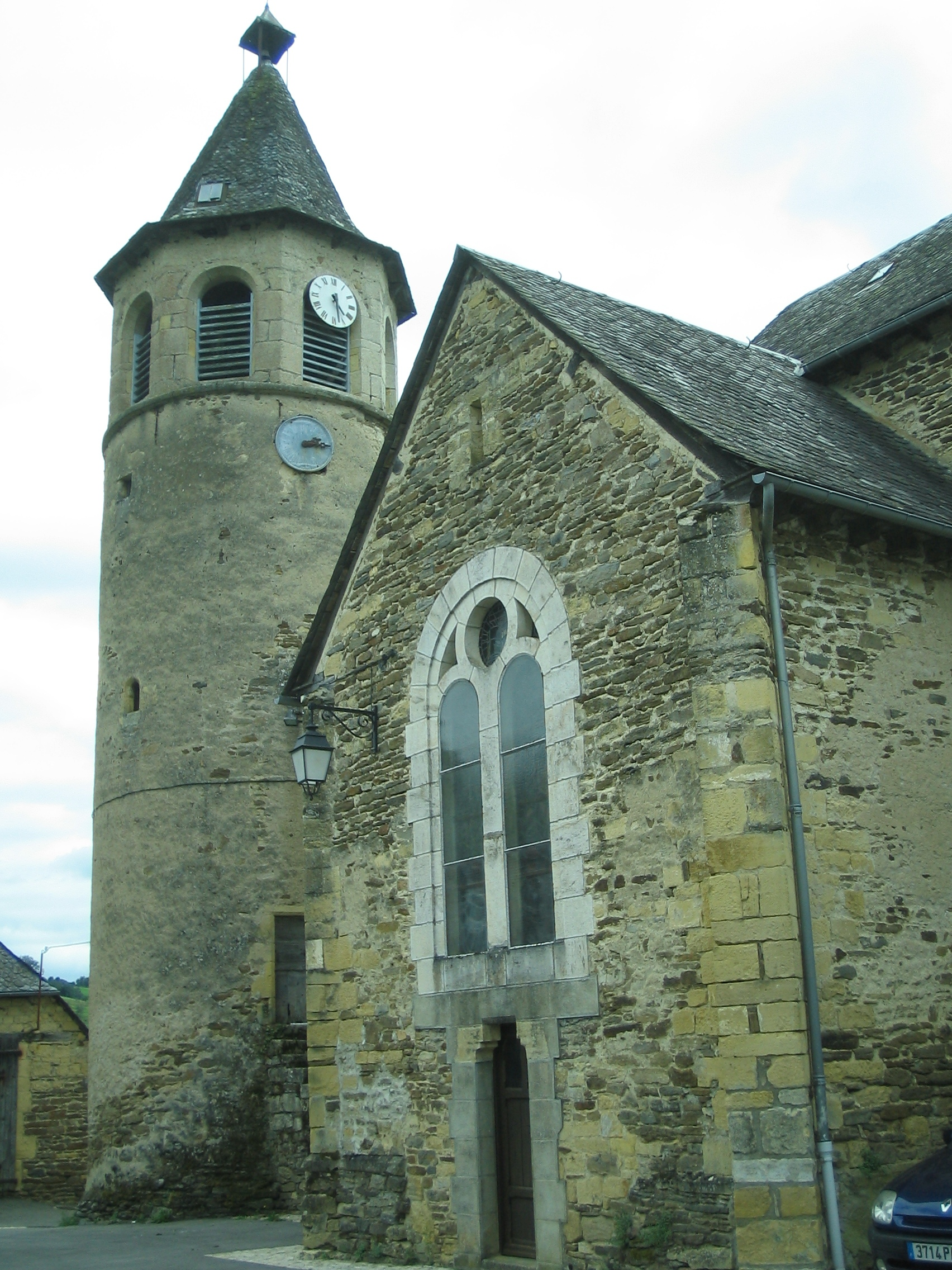 église de Castelnau-de-Mandailles (Aveyron)